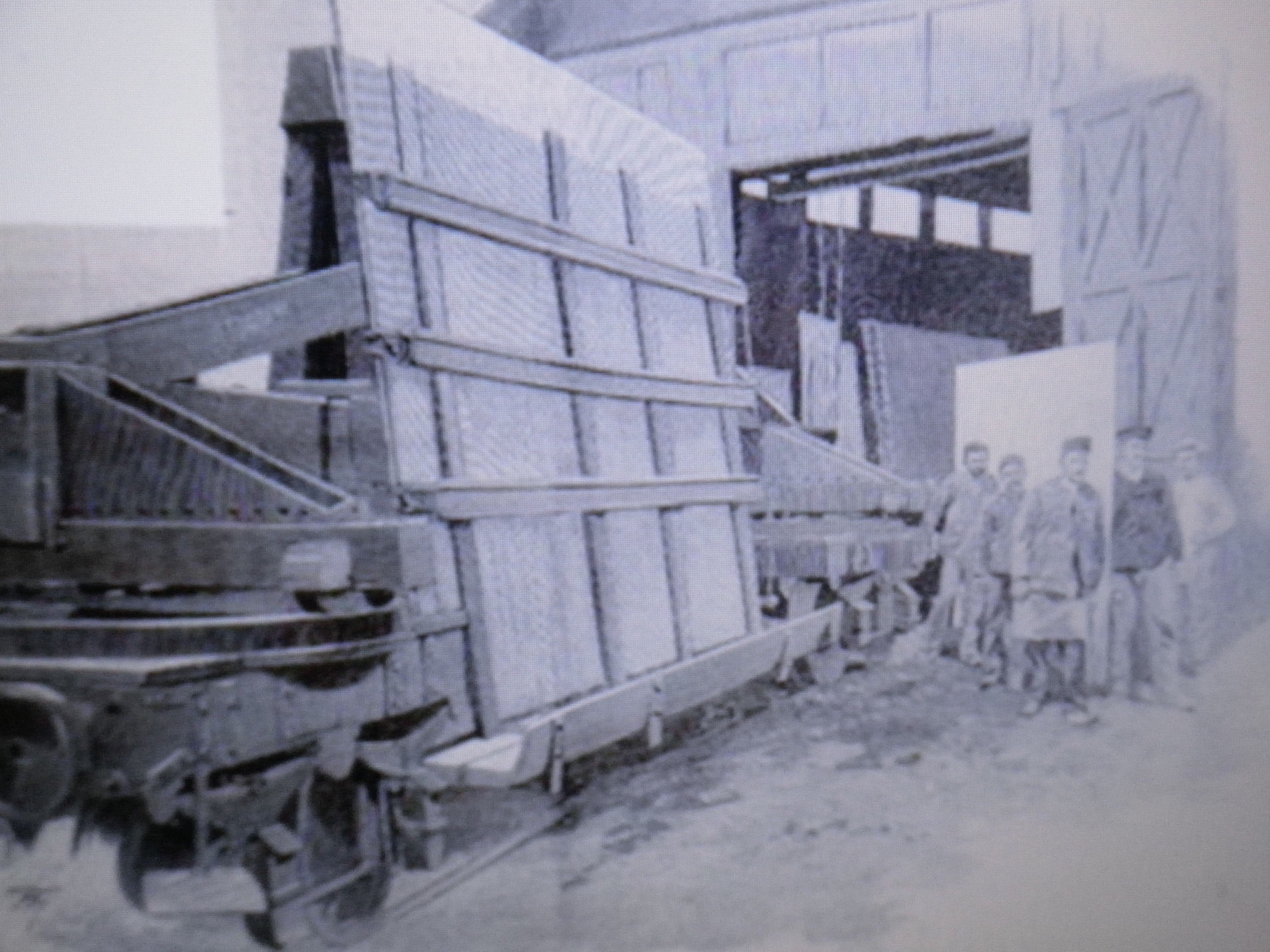 1865 glaces